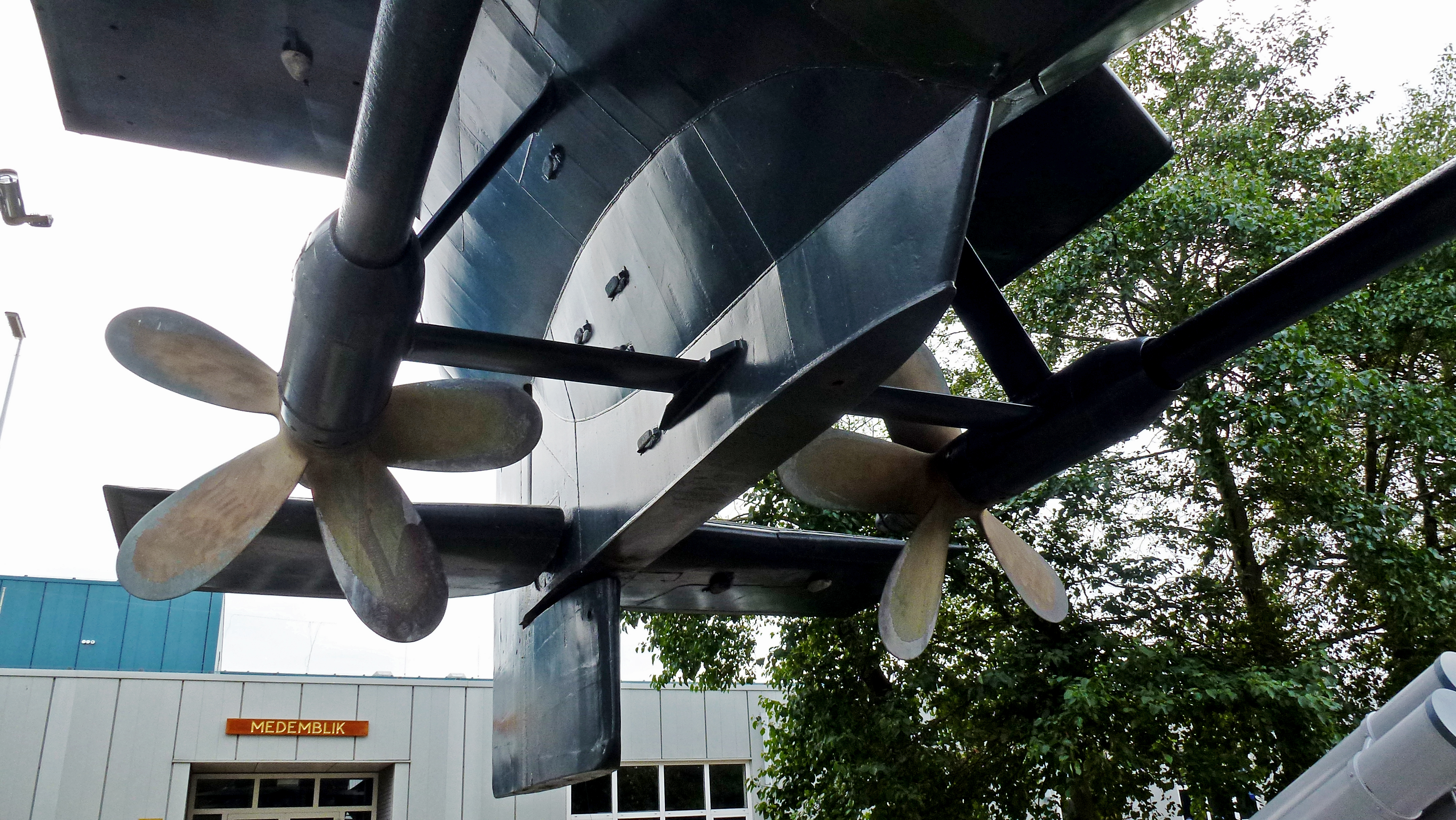 Museum onderzeeboot Hr.Ms. Tonijn (1966) met dubbele schroef bij Marinemuseum (Den Helder)